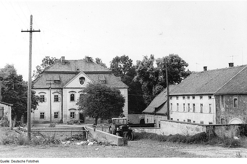 Original image description from the Deutsche Fotothek Rennersdorf. Gut Ober-Rennersdorf, zu dem ehem. die Windmühle auf dem Eichlerberg gehörte